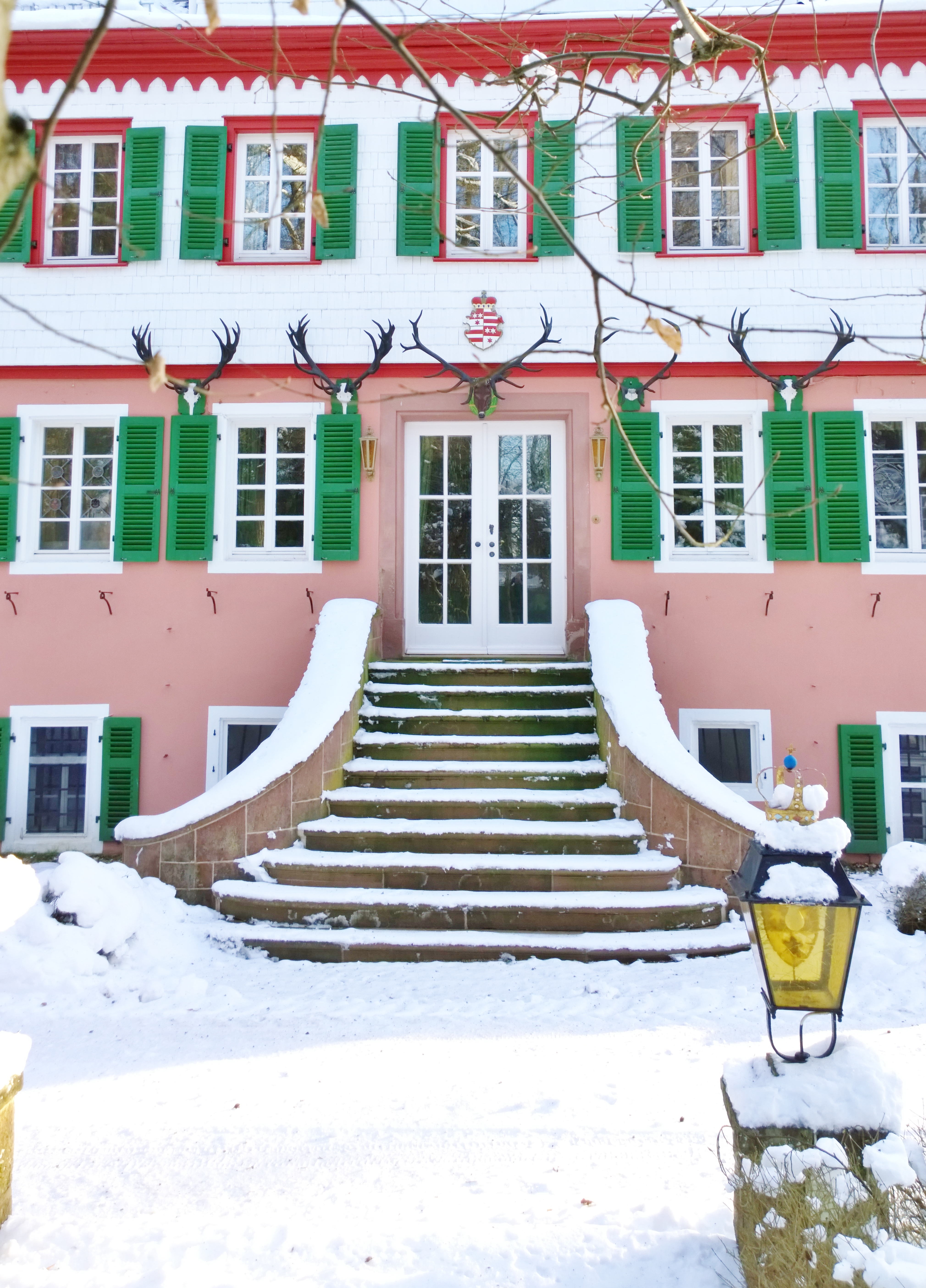 Freitreppe des Schlossgebäudes zur Straßenseite mit Erbacher Wappen und typischer Odenwald-Verschindelung des Hauses